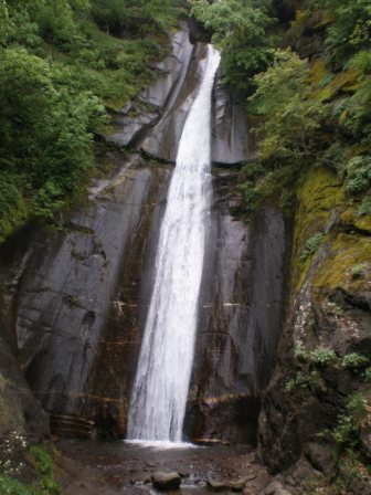 Smolare Waterfall